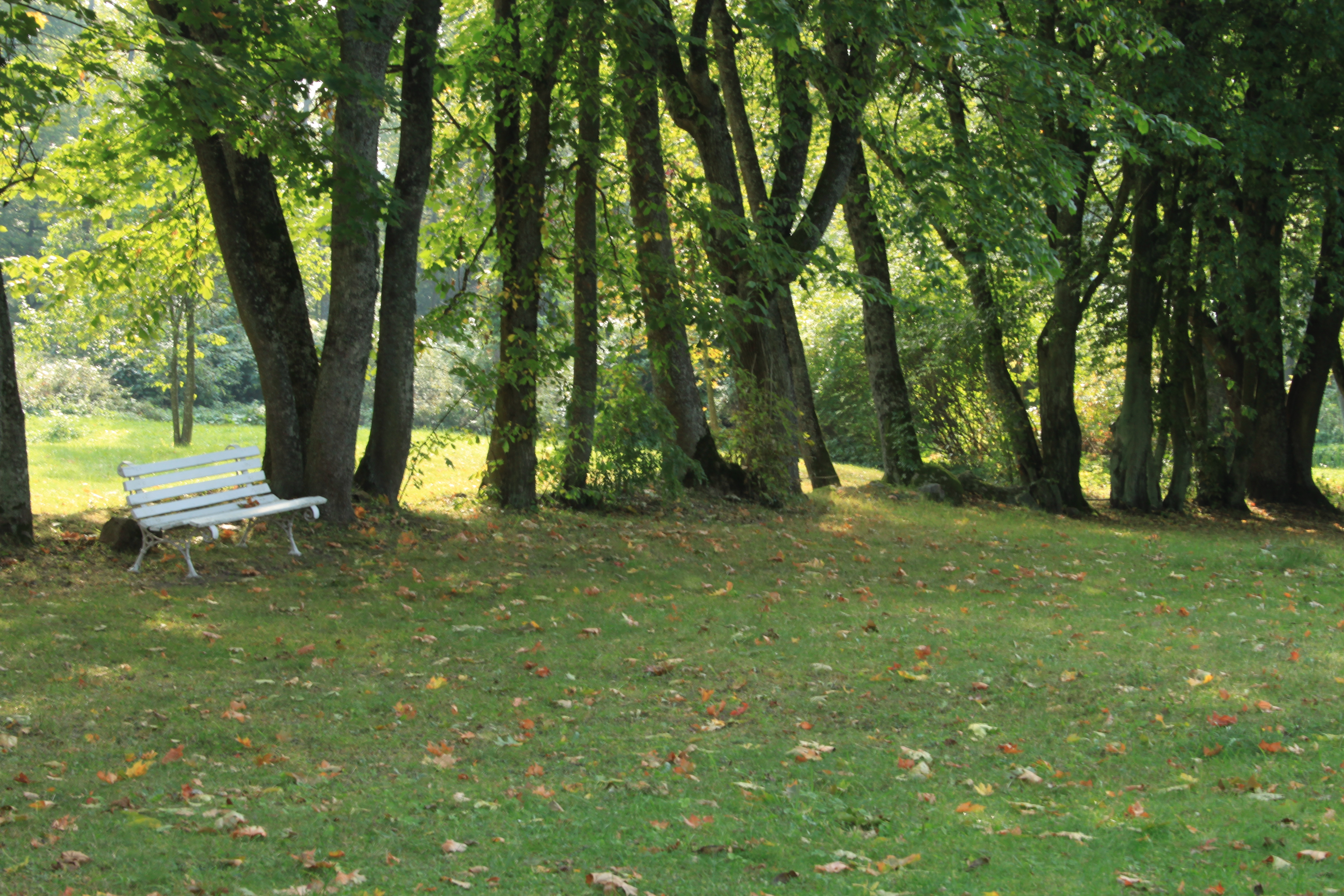 Jędrychowo, park, XVII